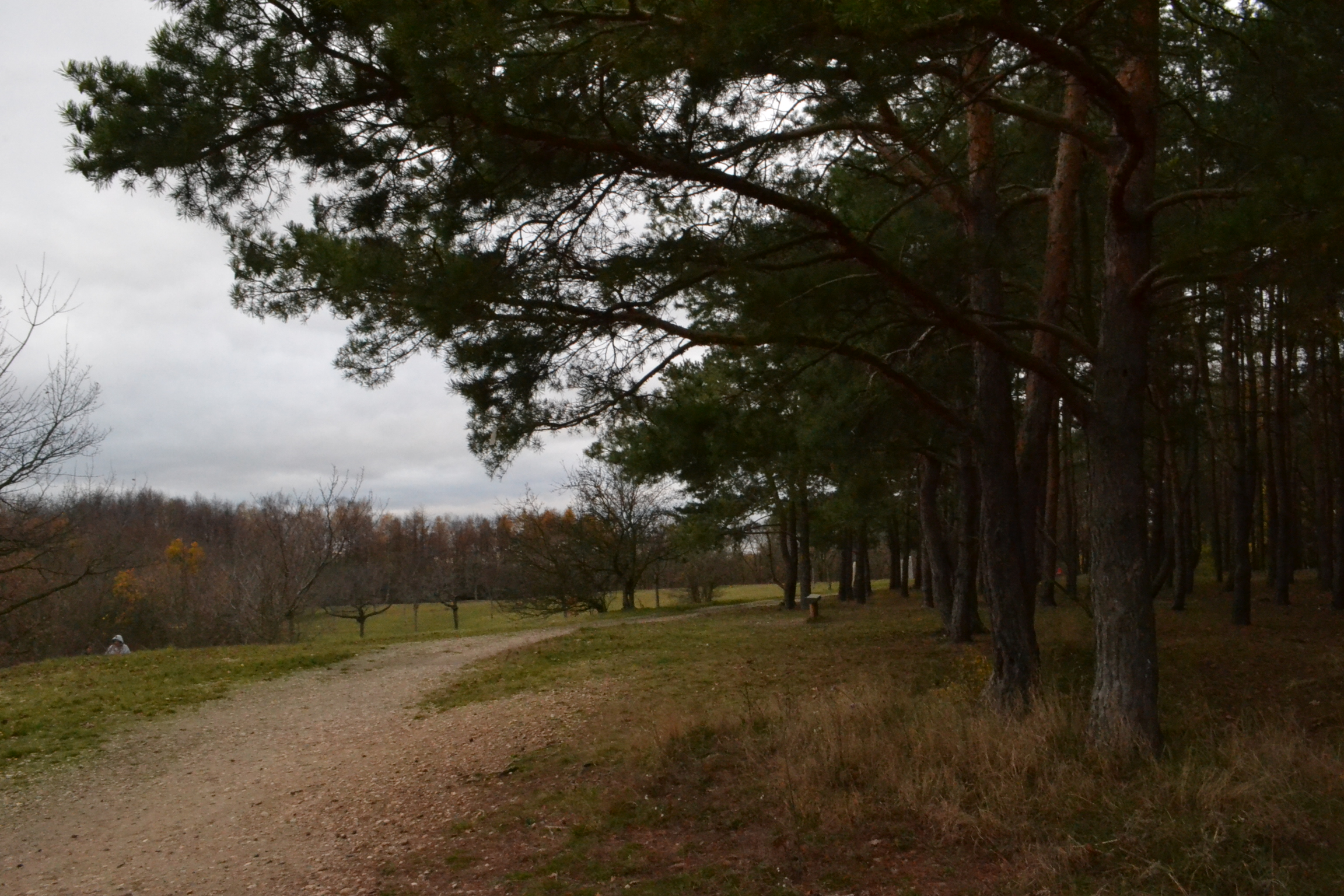 Cesta v horní částí Podhoří